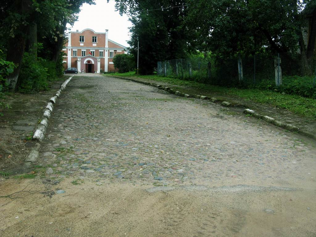 Беларуская (тарашкевіца): Астрына